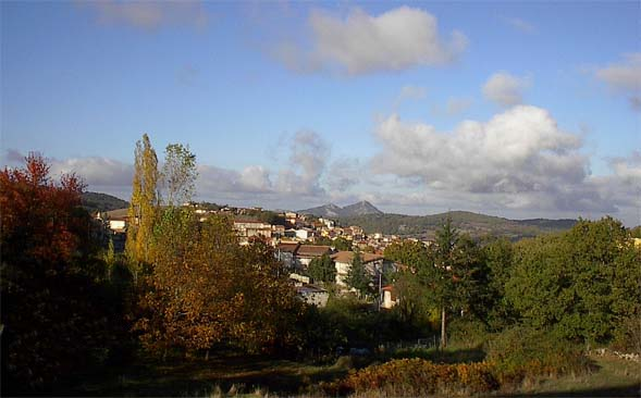 Ollolai: Panorama autunnale